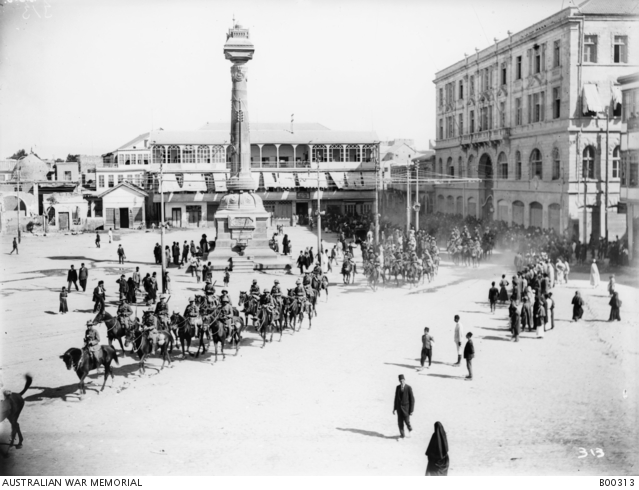 General Chauvel riding at the head of the Desert Mounted Corps during the official entry of the Allied forces into the town. גנרל הנרי שובל נכנס לדמשק